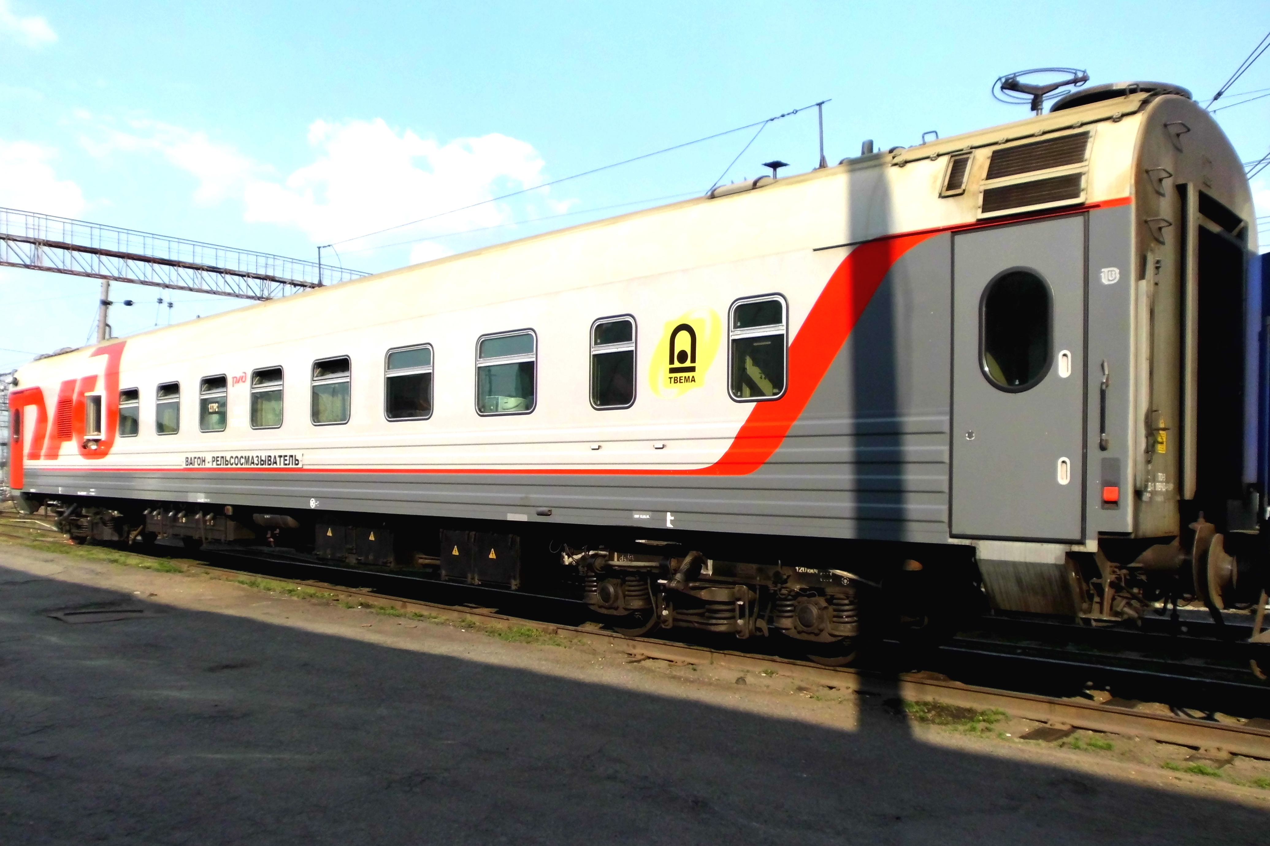 Вагон-рельсосмазыватель. ЮУЖД.